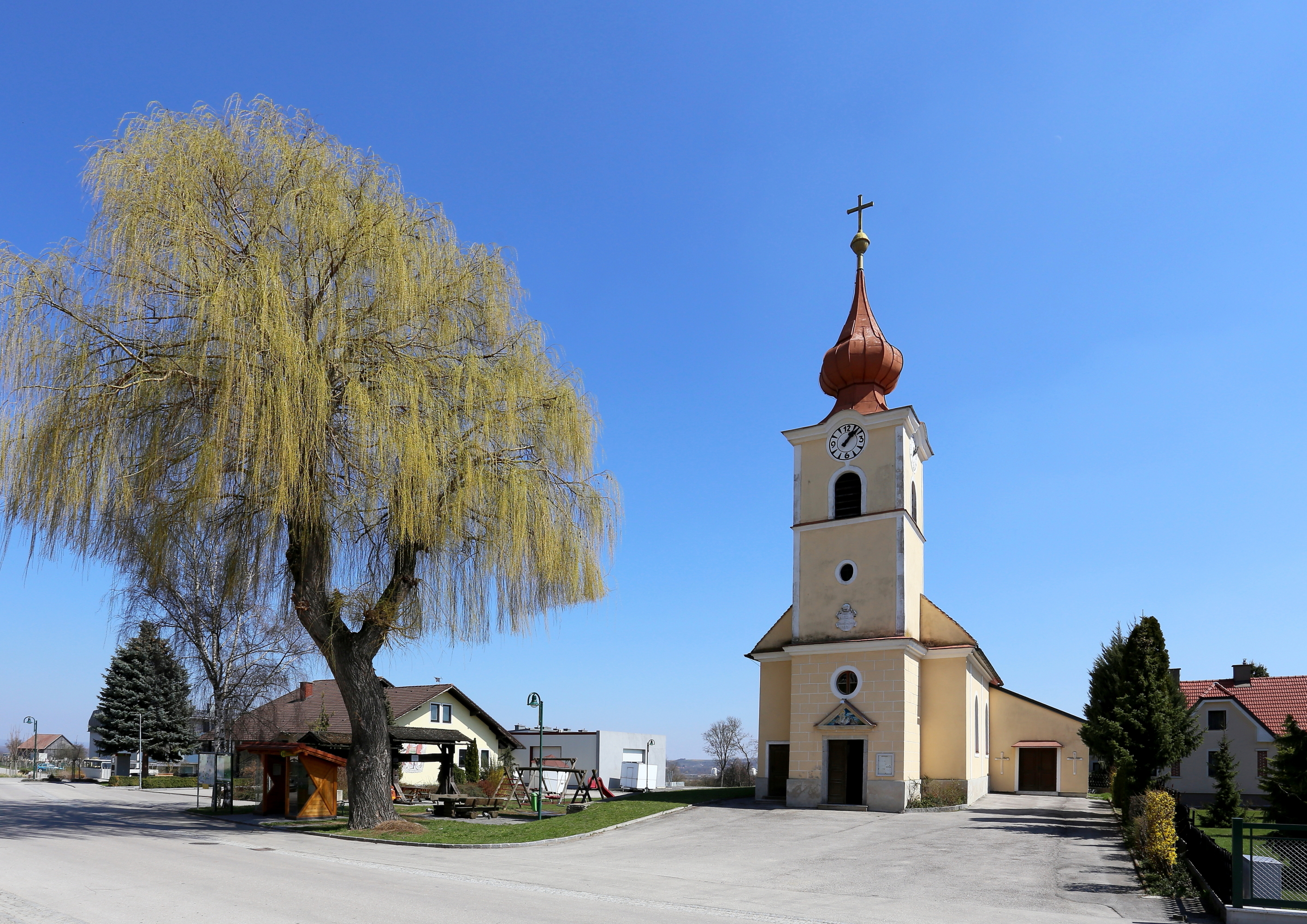 Katholische Filialkirche hl. Katharina in Reichersdorf, ein Ortsteil der niederösterreichischen Marktgemeinde Nußdorf ob der Traisen. Ein schlichter Bau aus dem Jahr 1830 mit einer rundbogig geschlossener Apsis und genutetem Westturm. Südseitig wurde 1972 eine Aufbahrungshalle angebaut.